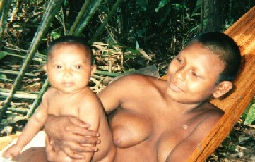 Mujer Nükák cuida a su bebita en la hamaca. 1993 hhmb.